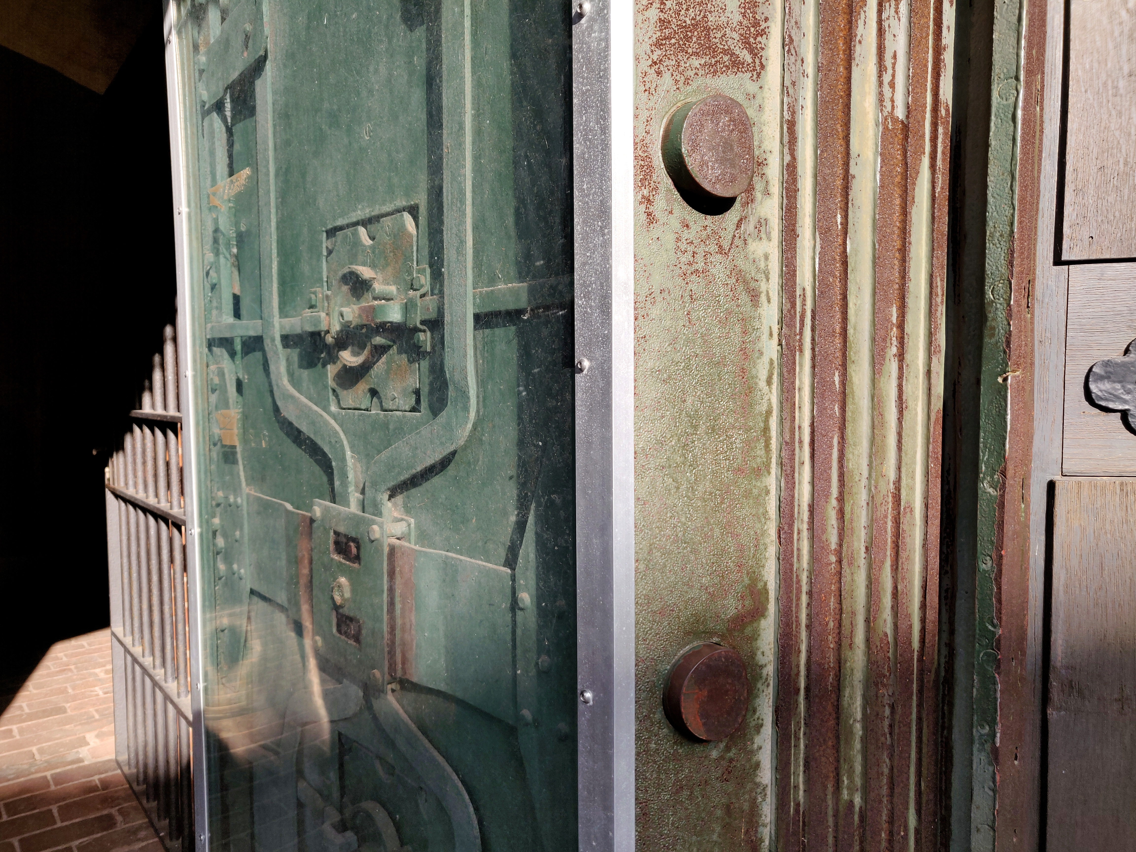 Eine Nahaufnahme der Stahltür des Juliusturm.